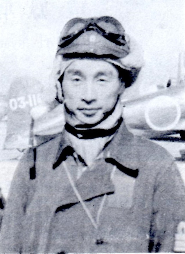 空母「飛鷹」戦闘機隊飛行隊長の頃の岡嶋（階級大尉）